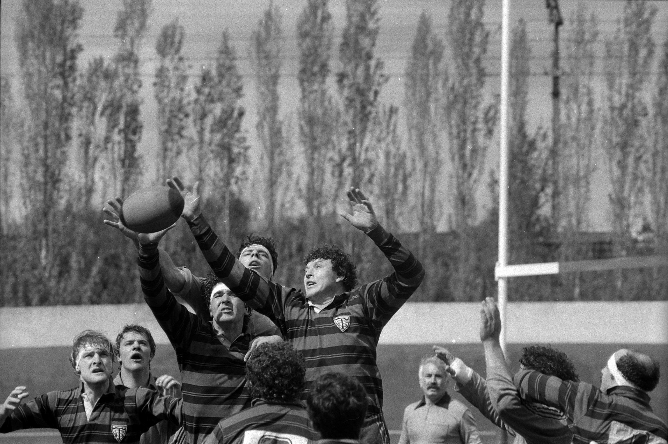 Stade Albert Domec à Carcassonne. Le14 Avril 1985. Vue d'une phase de jeu entre le Stade Toulousain et Narbonne.